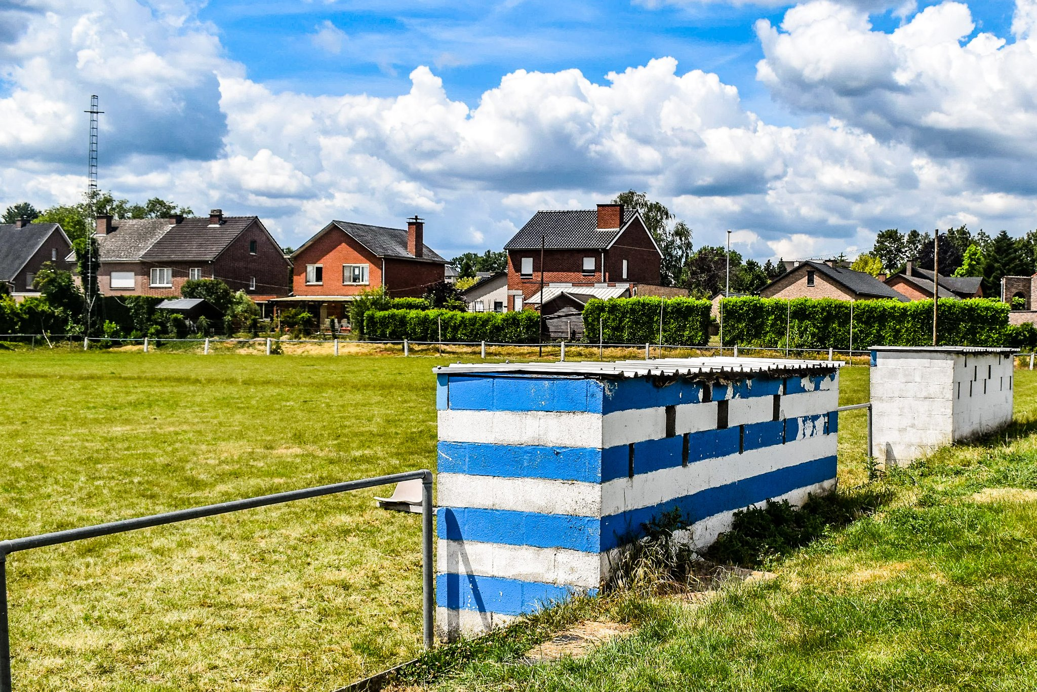 dugout